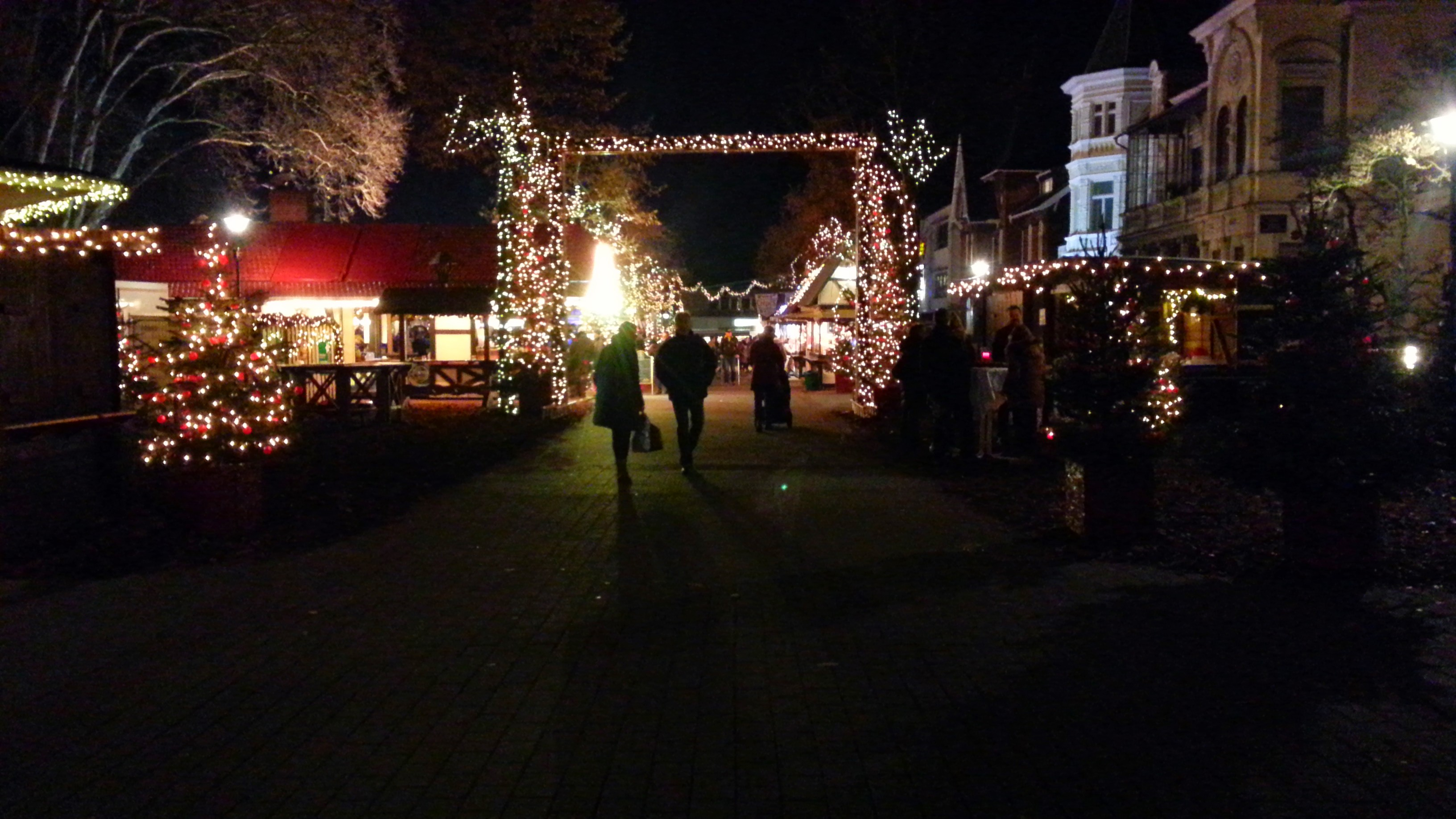 Der Weihnachtsmarkt in Bad Oeynhausen im November 2014